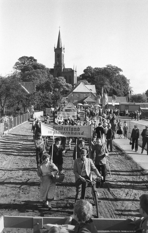 Redefin, Erntefest ADN-ZB/Pätzold/19.10.85/Bez. Schwerin: Zentrales Erntefest/ Ein farbenfroher Umzug durch den Ort bildete den Auftakt für das Erntefest der Kooperation Redefin im Kreis Hagenow. Anschaulich stellte er die tiefgreifenden Veränderungen in den mecklenburgischen Dörfern seit der Demokratischen Bodenreform dar. Der Festzug endete auf dem Paradeplatz des Hengstdepots Redefin, wo symbolisch an Werner Felfe, Mitglied des Politbüros und Sekretär des ZK der SED, die letzte Garbe der diesjährigen Ernte übergeben wurde.